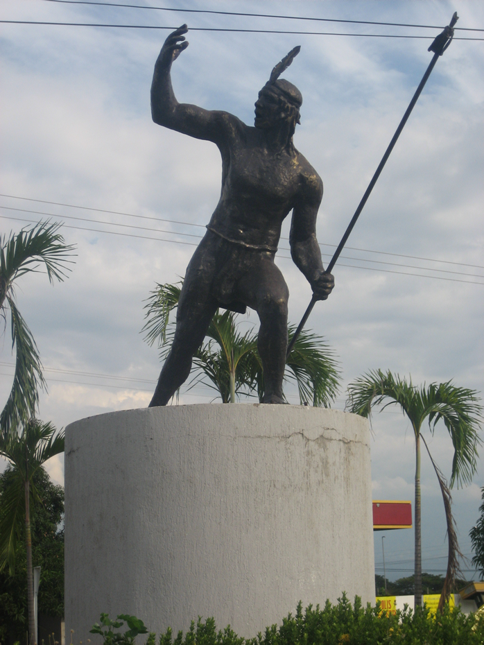 Image of Cacique Upar statue Valledupar, Colombia